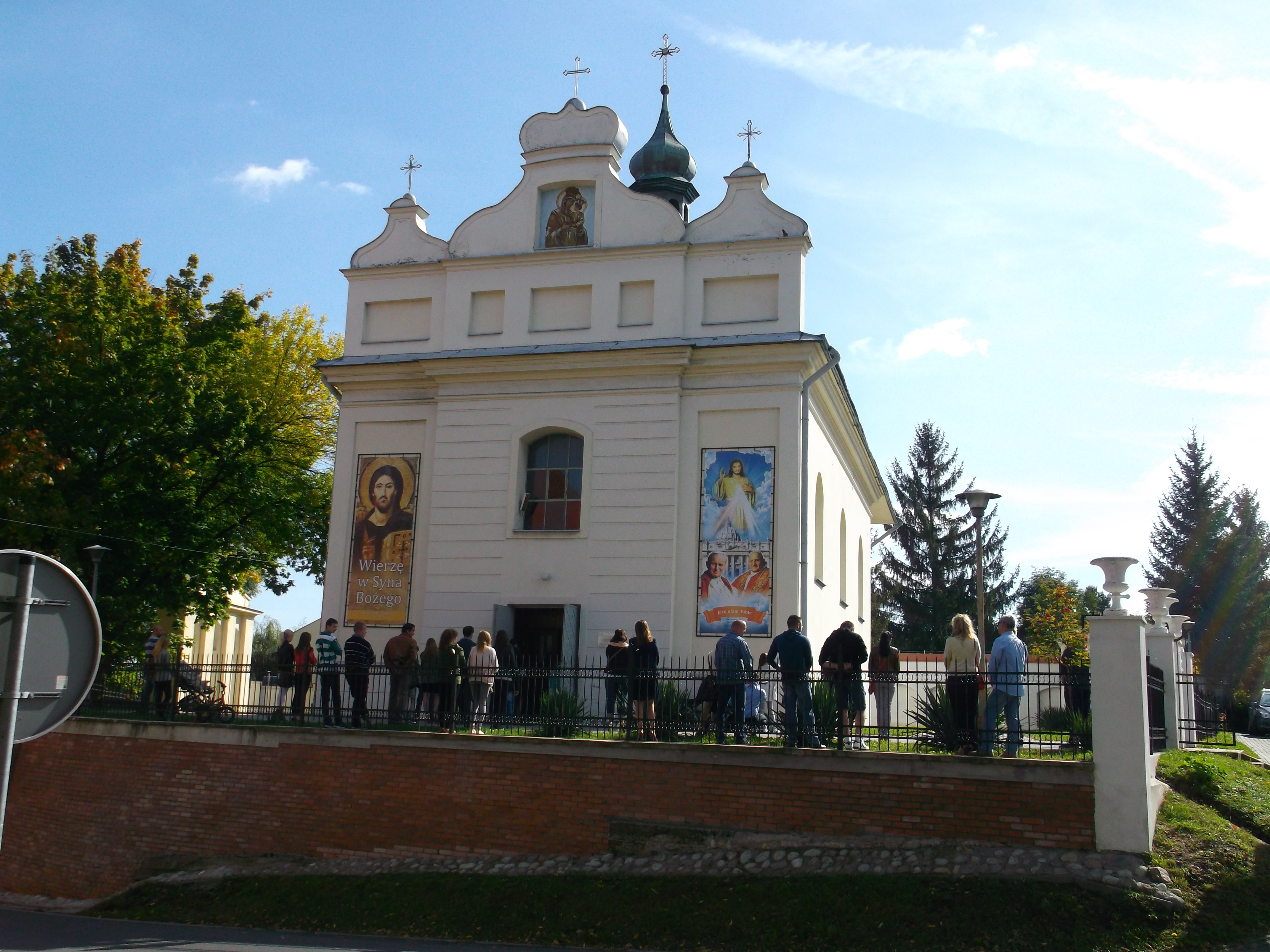 Leżajsk, cerkiew gr.-kat. p.w. Zaśnięcia Bogurodzicy, ob. kościół rzym.-kat. p.w. Pana Jezu…, 1831